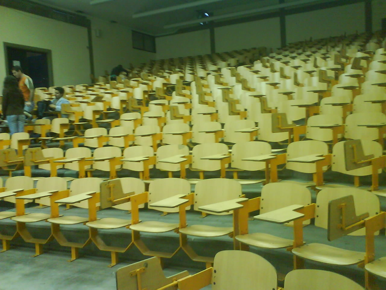 Anfiteatros que pertenecen al Anexo de la Facultad de Derecho y Ciencias Sociales de la Universidad Nacional de Tucumán ubicados en la Quinta Agronómica